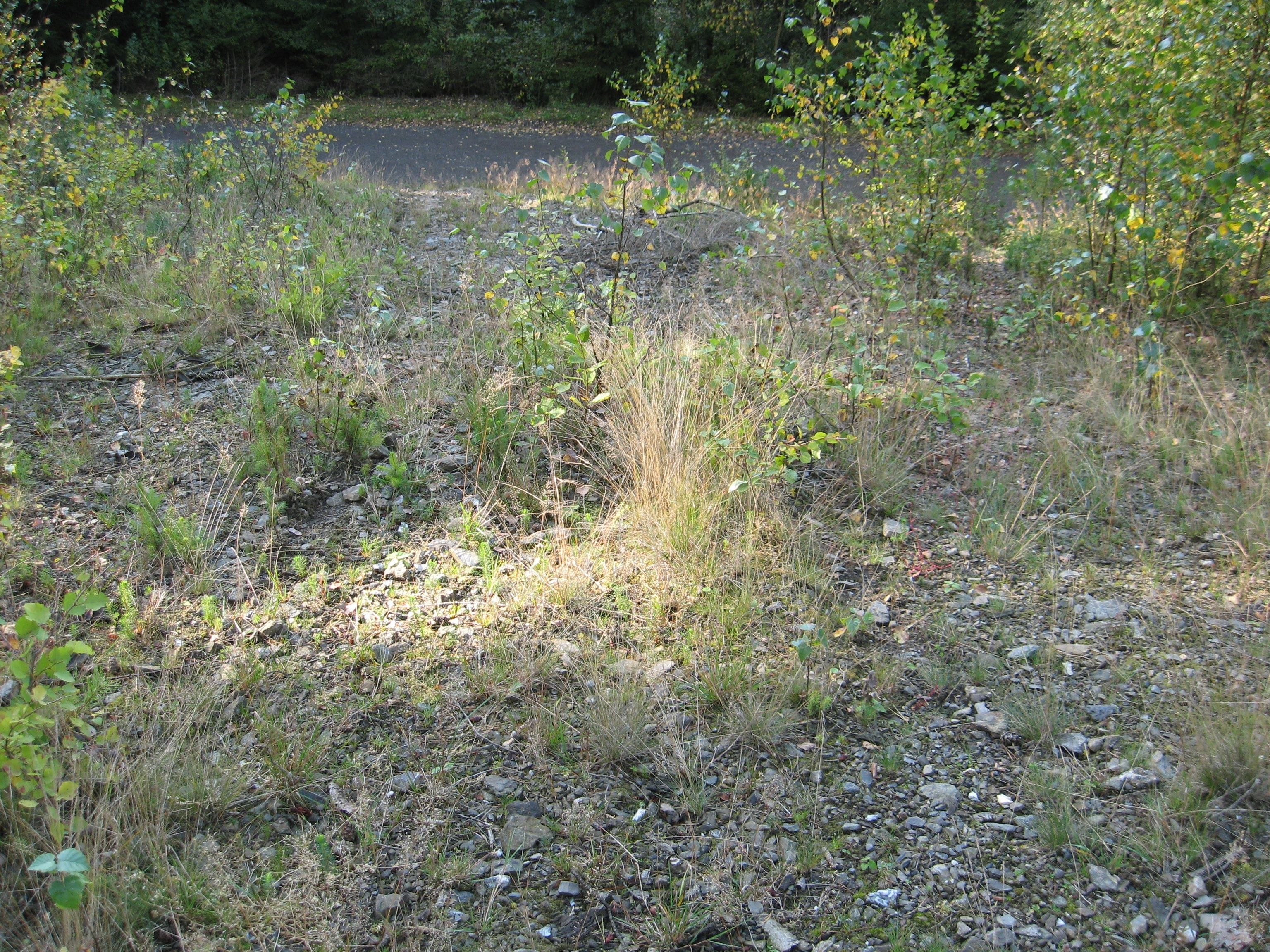 Abraumhalde der Grube Junger Löwe in Salchendorf (Neunkirchen) / Siegerland.